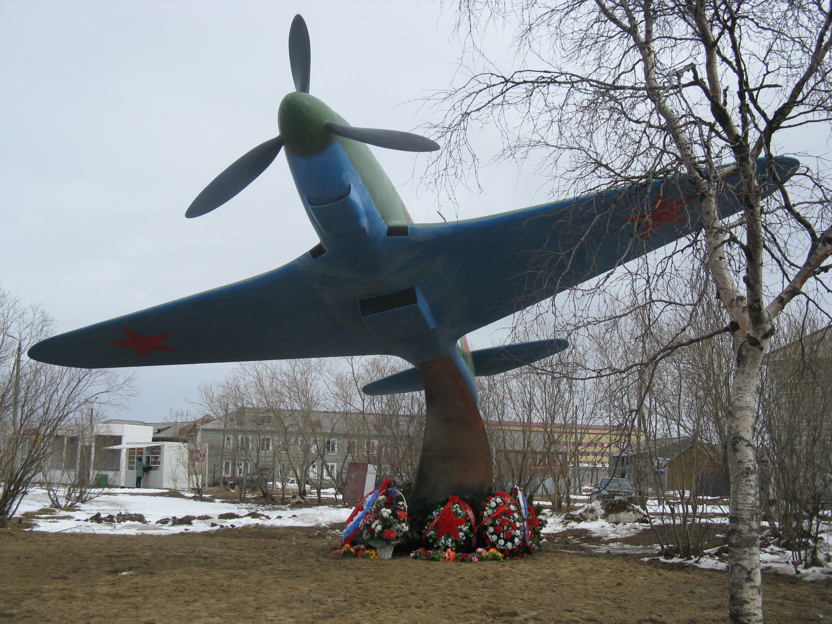 Фото памятника Яку-7Б в Нарьян-Маре